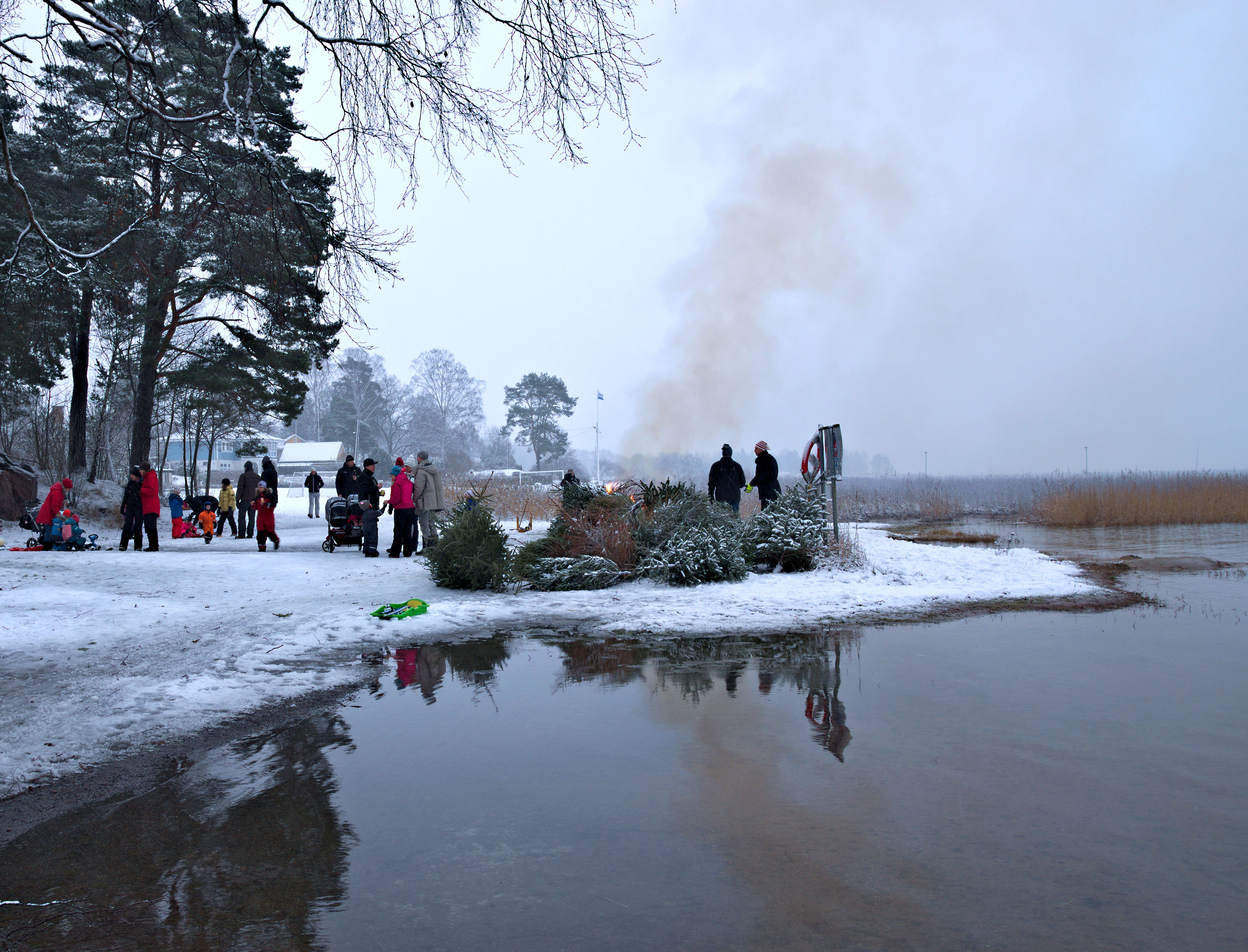 Österskärs villaägarförenings julgransplundring på stranden. Folkfest med julgransbränning, fika, grillkorv och fiskdamm.